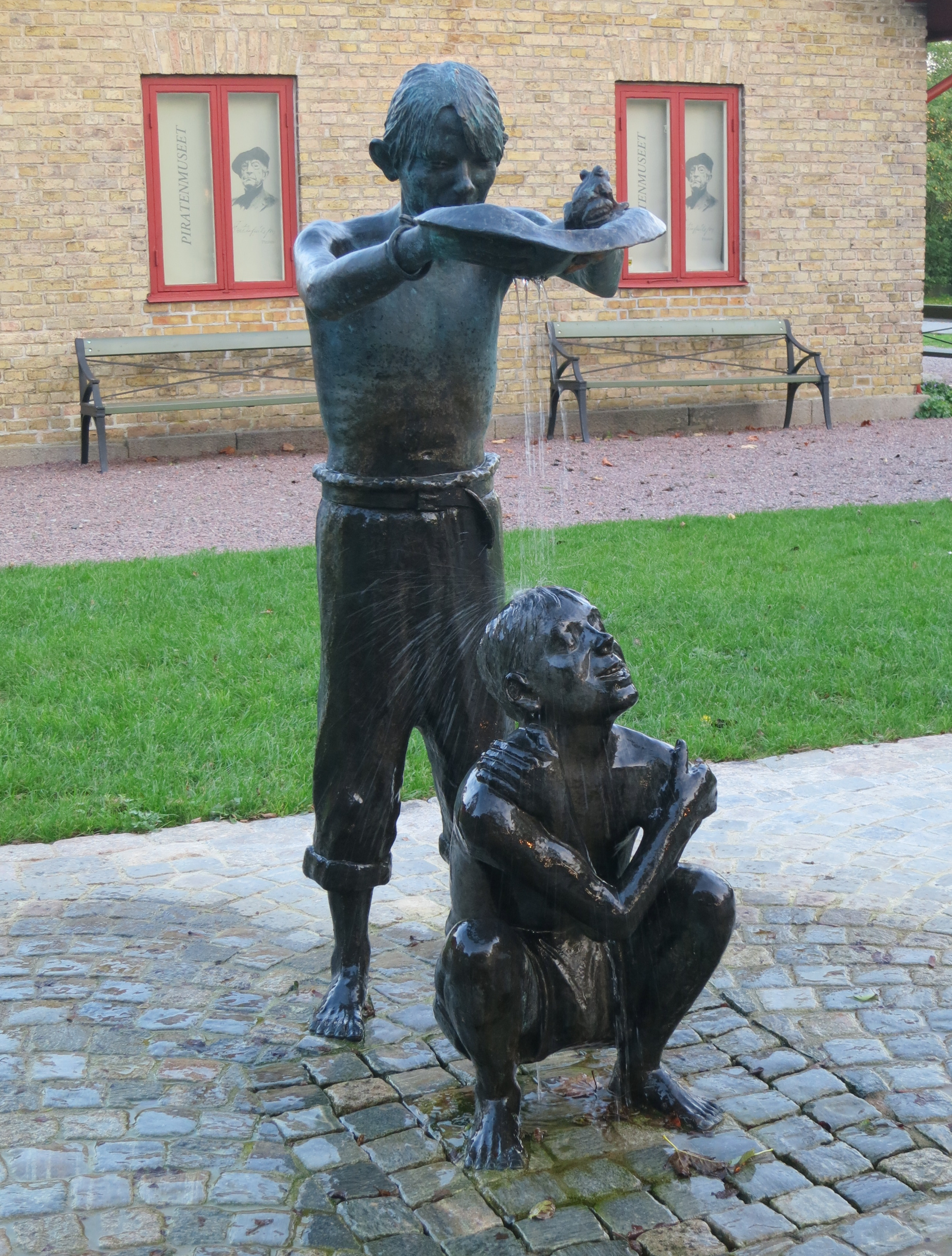 Bombi Bitt och Eli, skulptur av Jonas Högström i Vollsjö